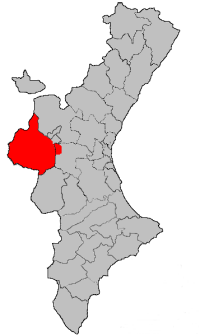 Àrea de la Denominació d'Origen Utiel-Requena